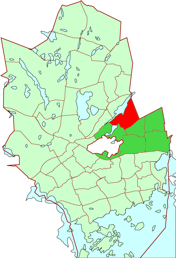 Laaksolahti/Dalsvik district in Espoo city